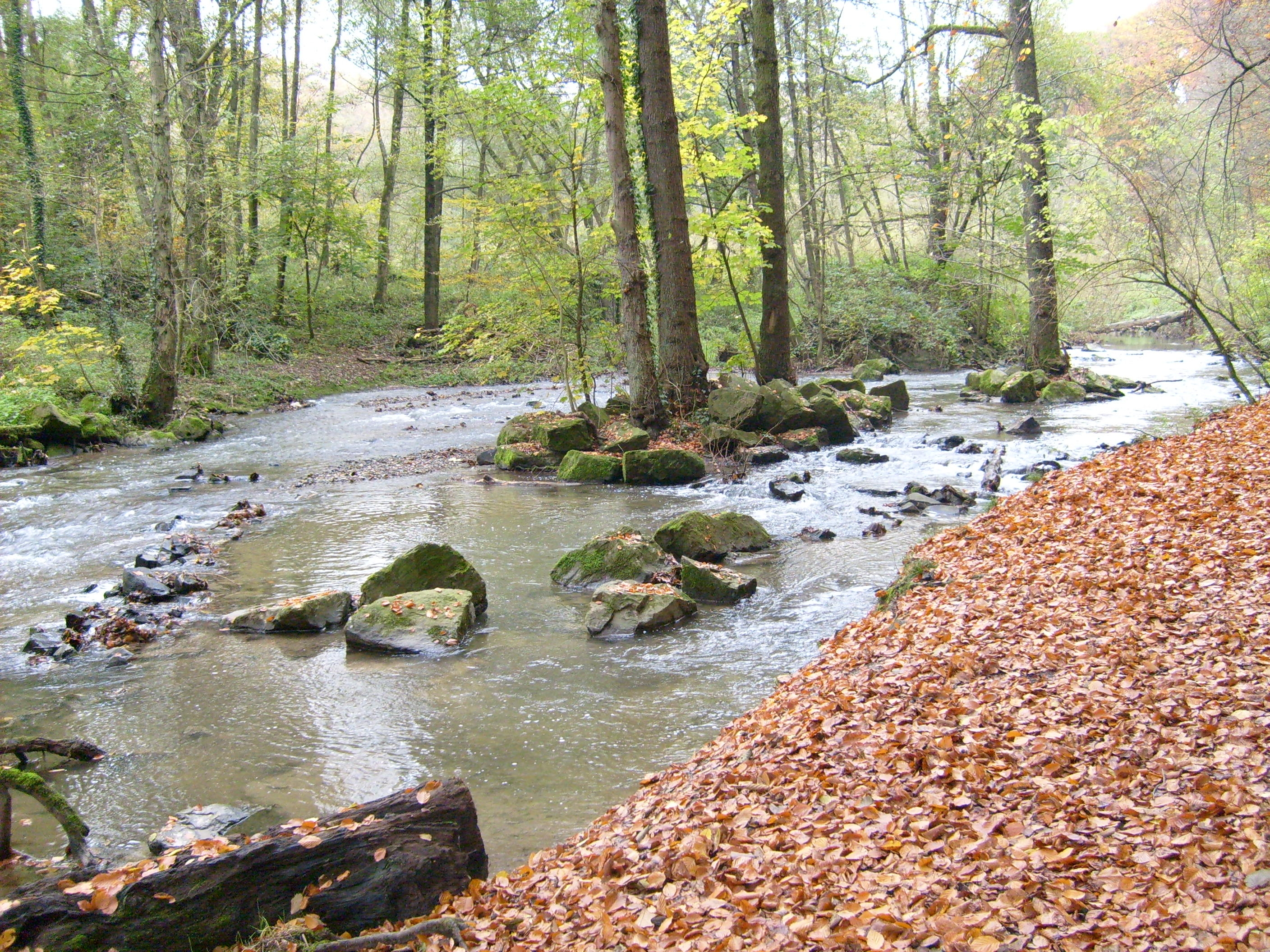 Die Düssel im Naturschutzgebiet „Westliches Neandertal“ in Erkrath (Abschnitt zwischen Feldhofer Kalkofen und Alt-Erkrath)